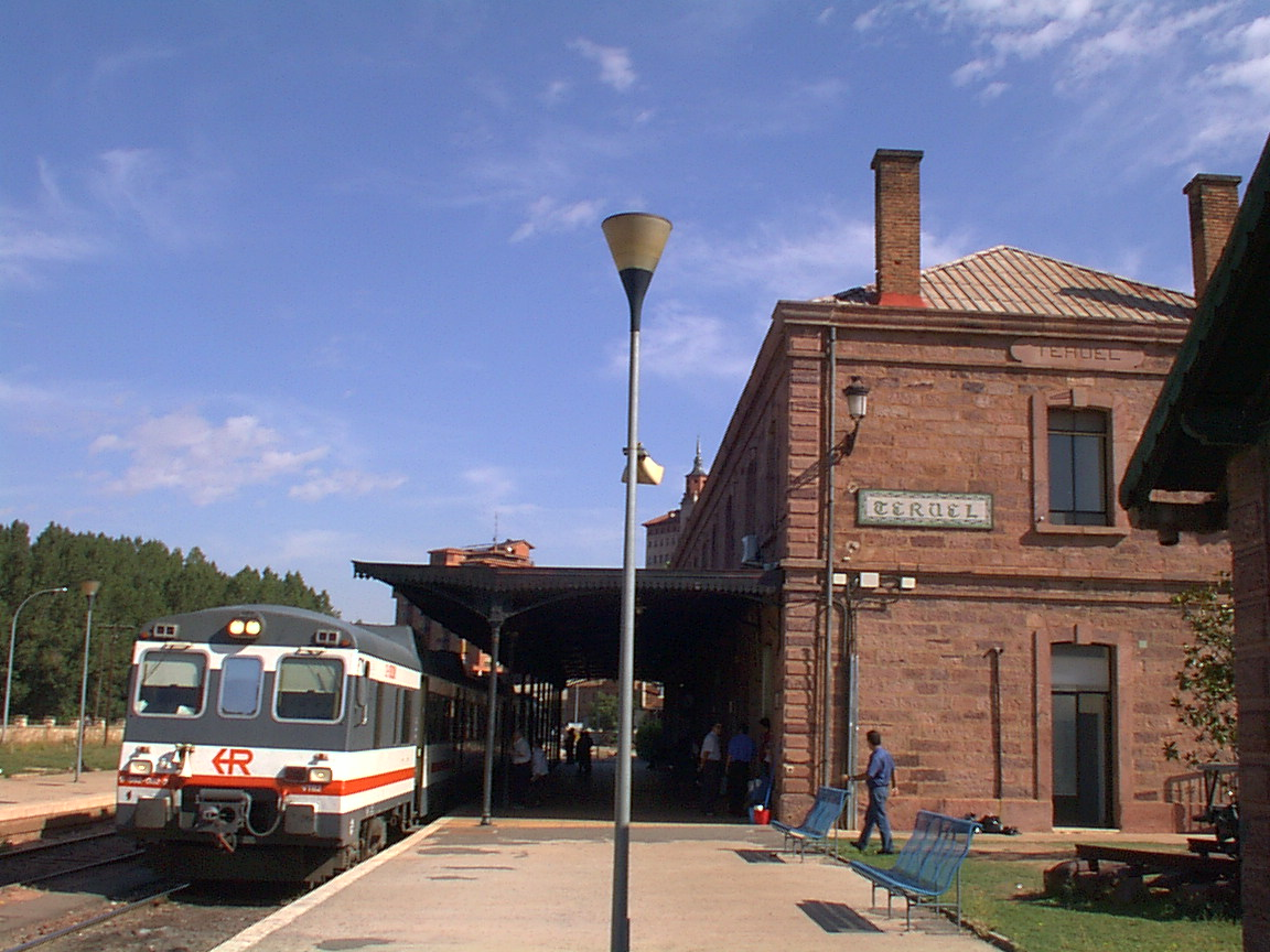 Un automotor diésel de la serie 592 de Renfe Operadora en la estación de Teruel.